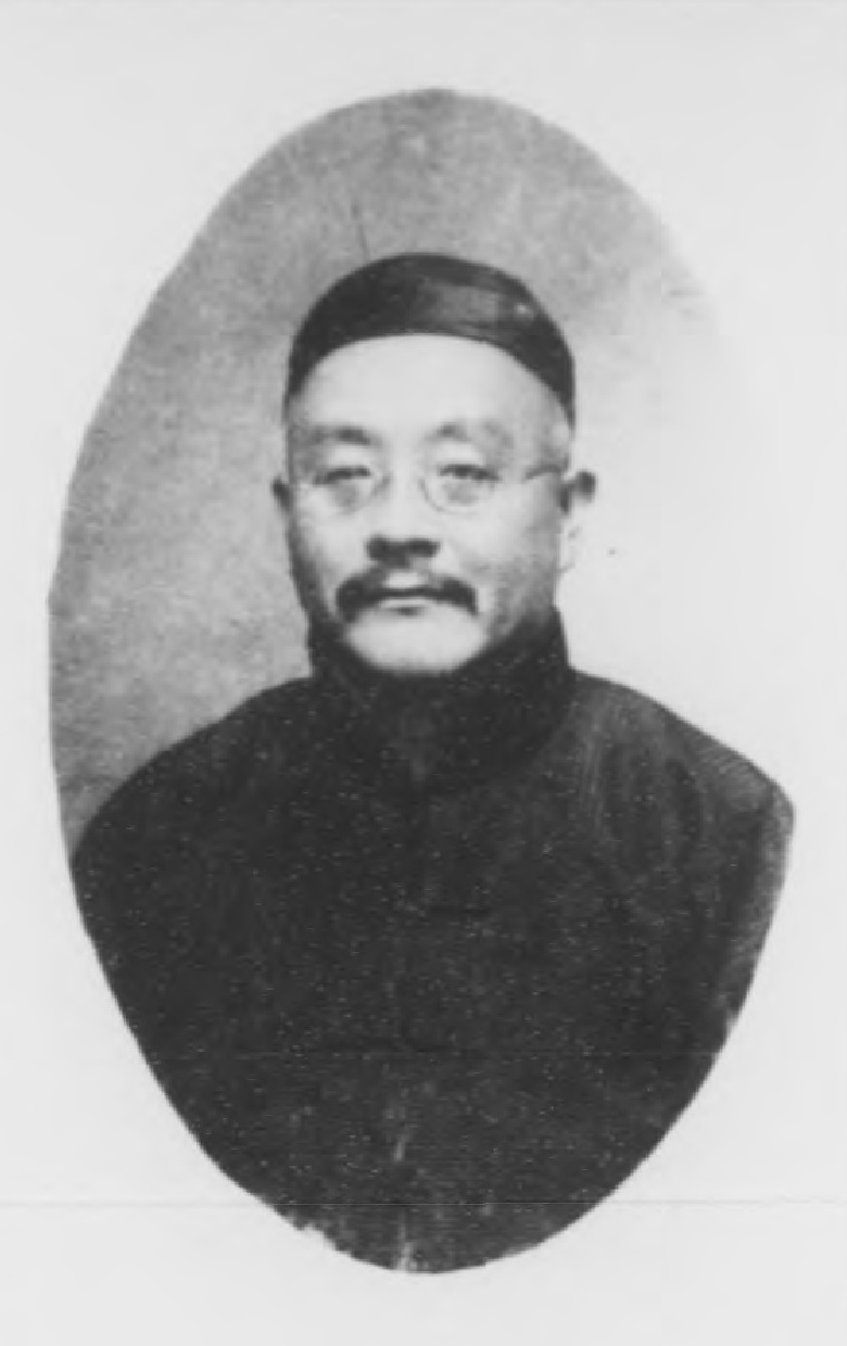 光緒甲辰科進士小像